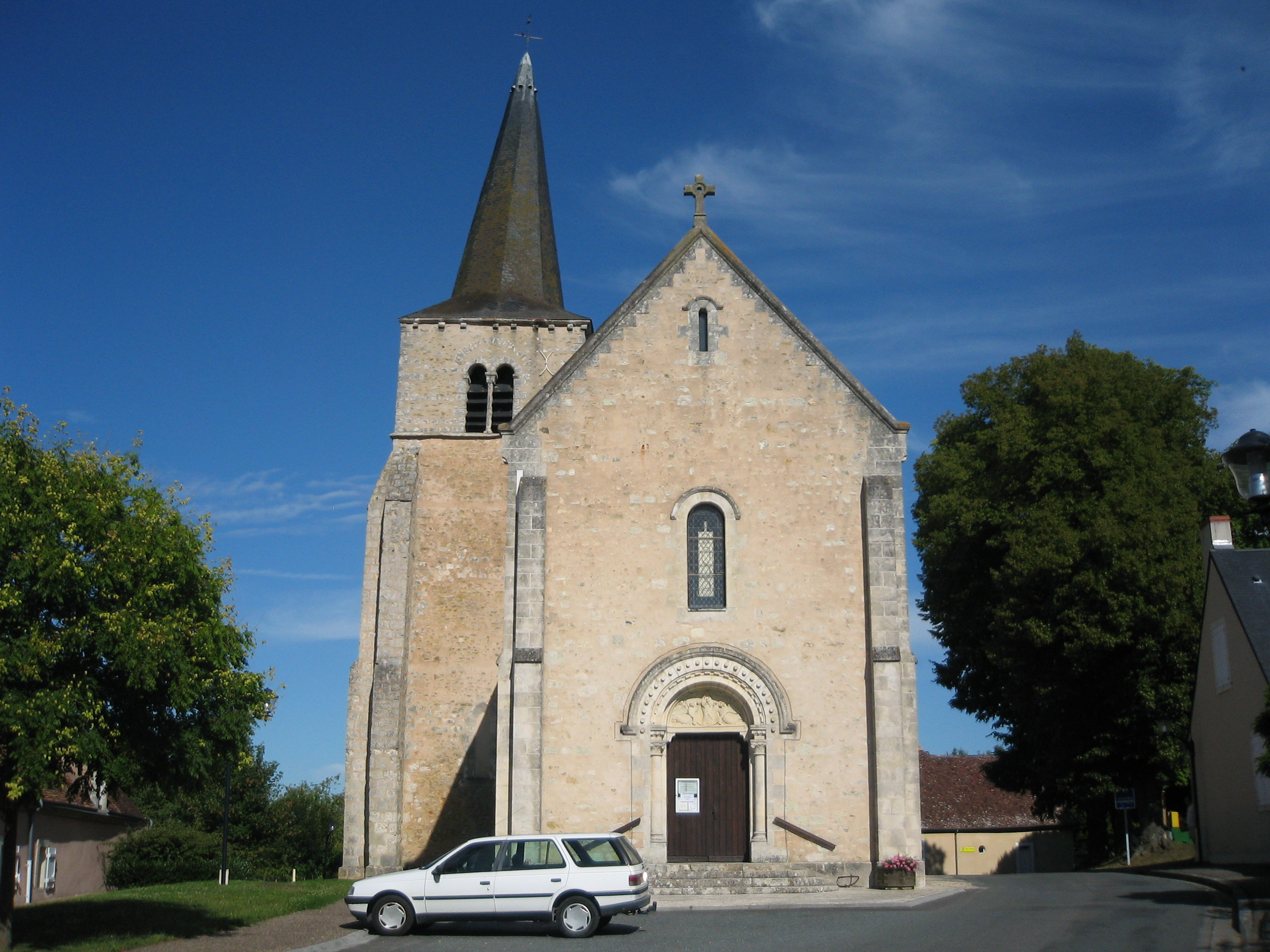 Eglise Notre Dame, XIe et XIIe, Lazenay (Cher).